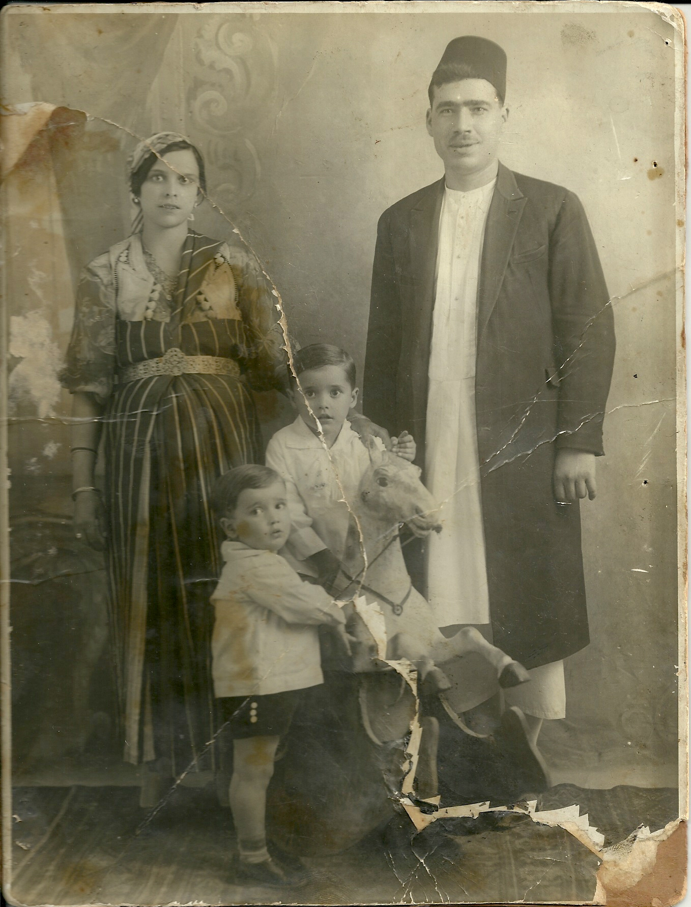 בתמונה רואים משפחה יהודית בטריפולי